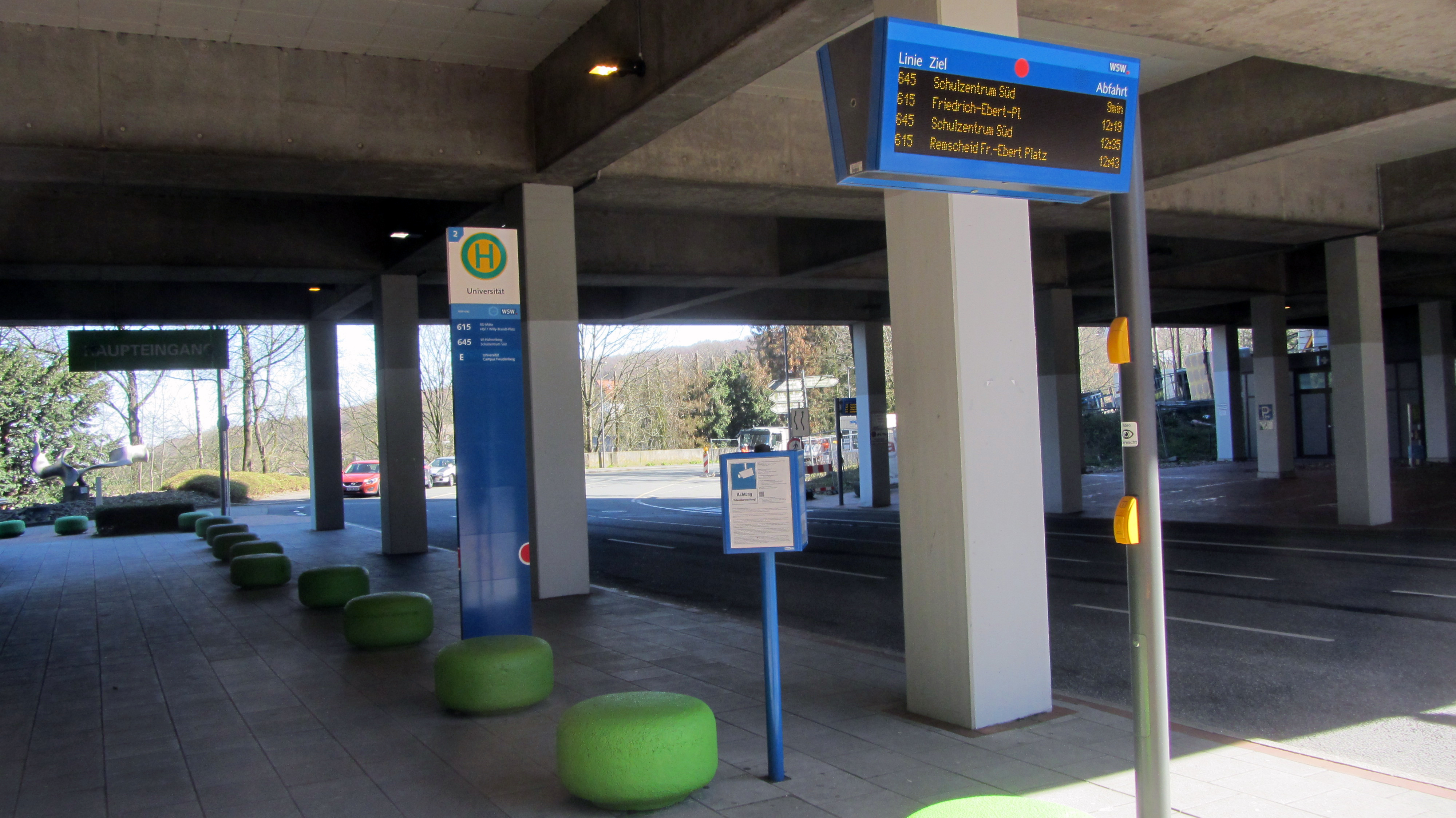 Die Bushaltestelle der Linien 615, 645 und E an der Wuppertaler Universität.